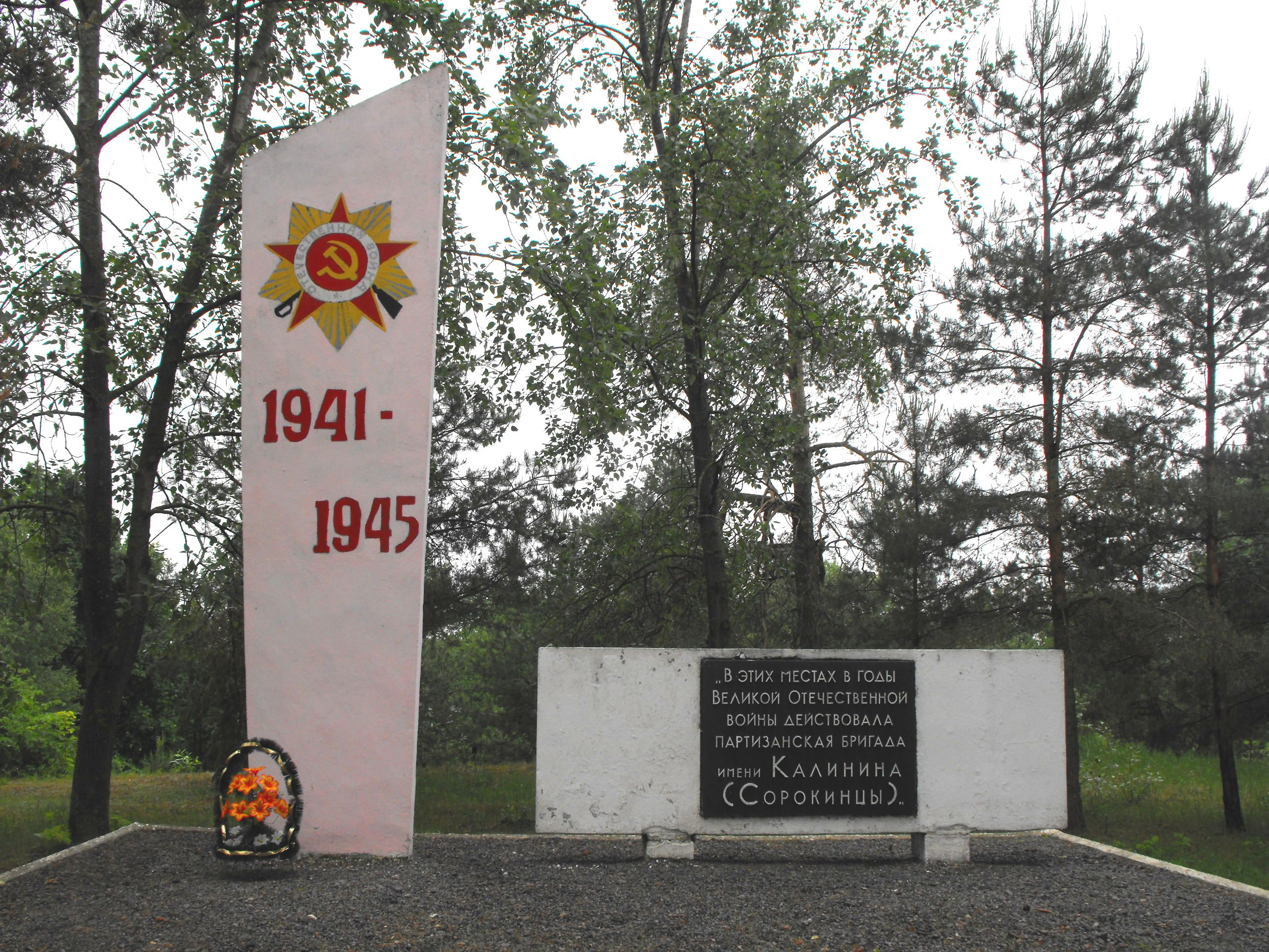 Мемориал в деревне Поречье Селецкого сельсовета Пуховичского района Минской области в память о партизанах и жителях деревни, спасавших еврейских детей из Минского гетто в годы Великой отечественной войны.